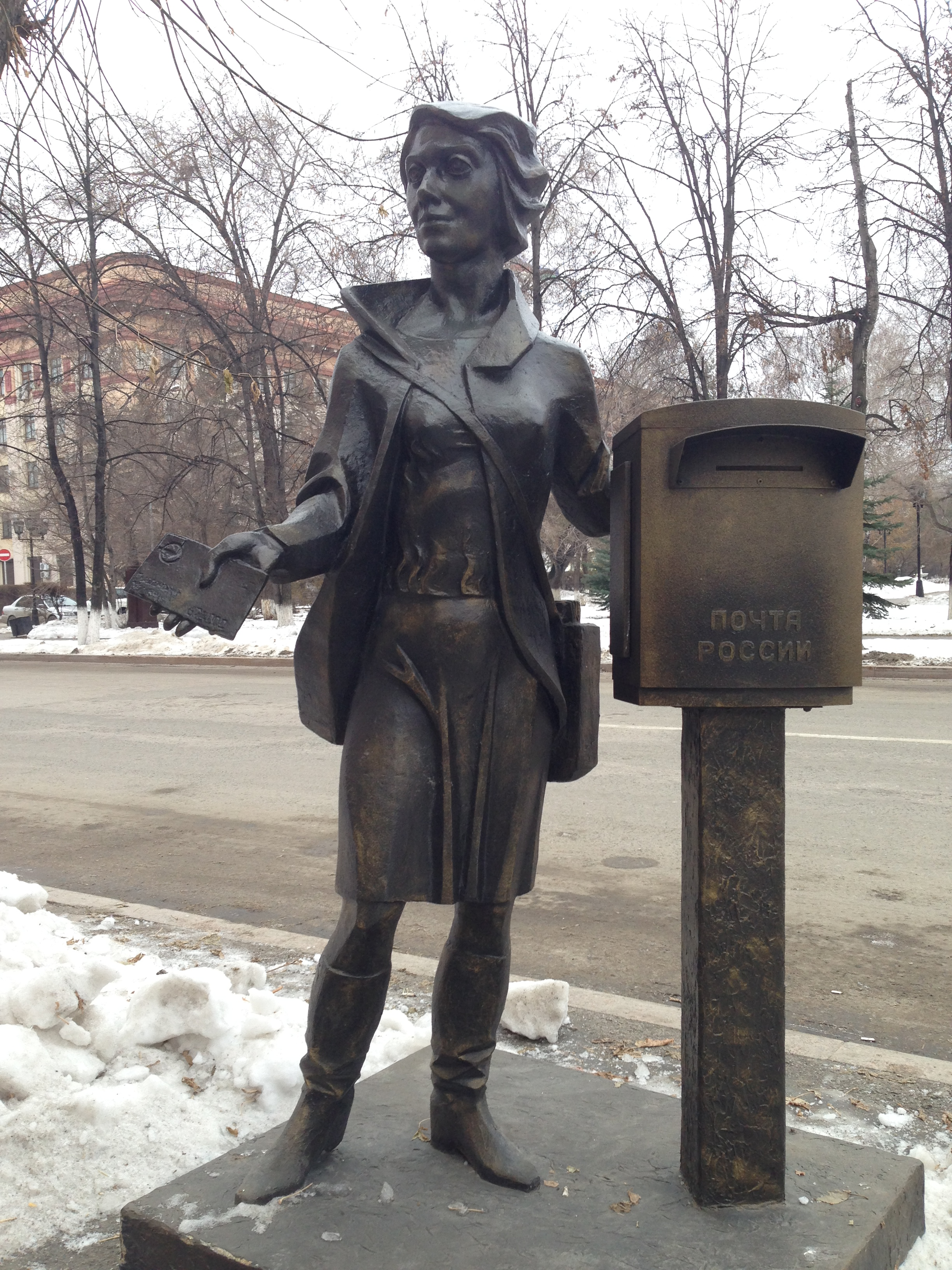 Monumento al.poŝtisto apud la ĉefpoŝtejo. Strato Respubliki, Tjumeno, Rusio.